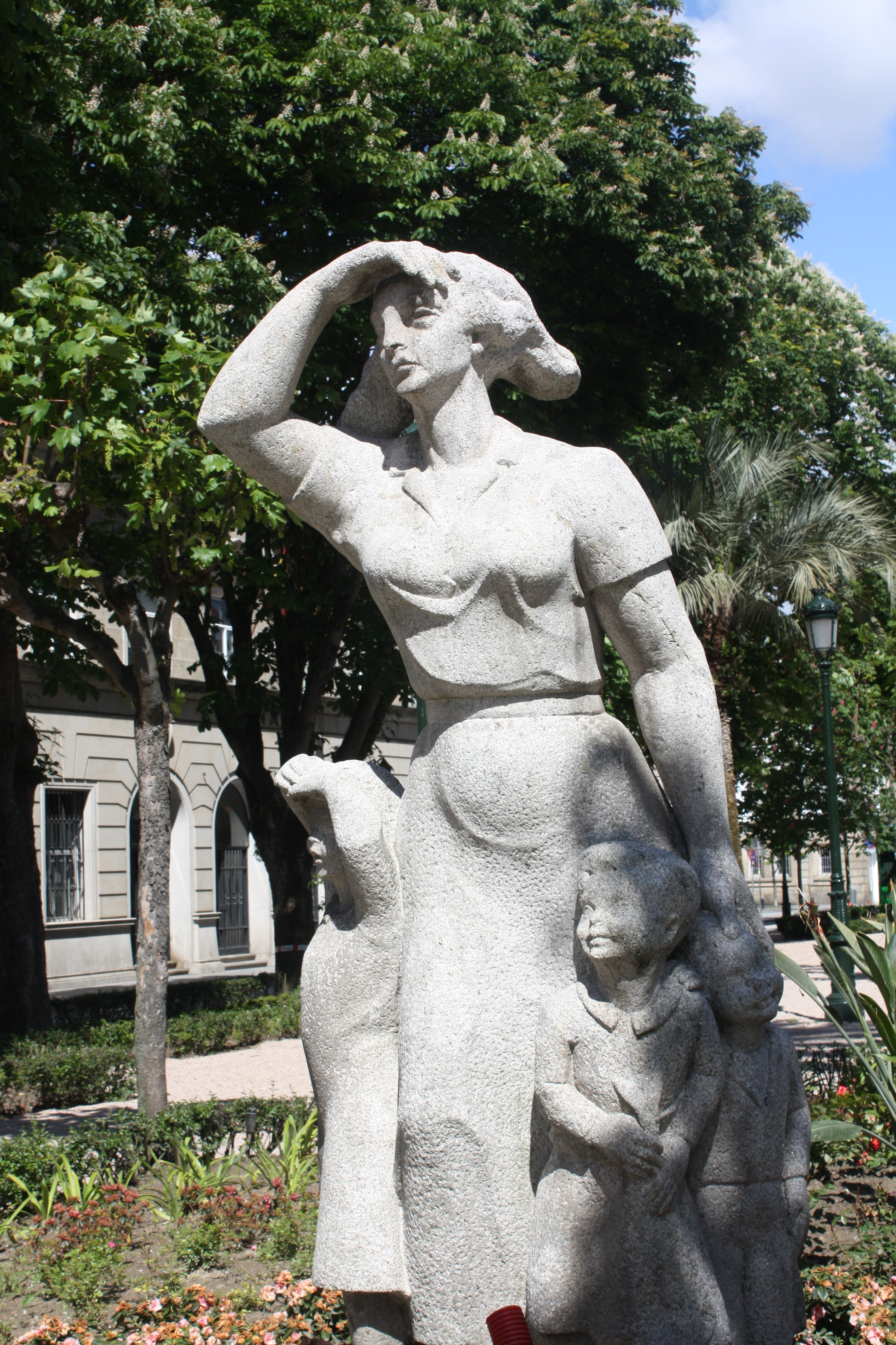 Estatua á muller do mariñeiro (A Alameda, Vigo) (Camilo Nogueira Martínez).